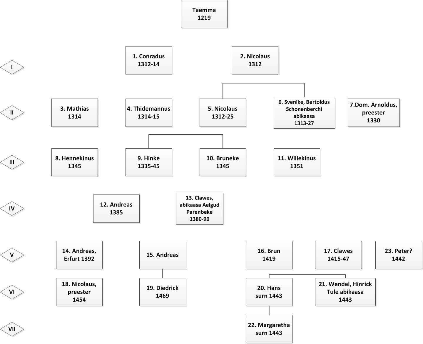 Kegelite sugupuu joonis